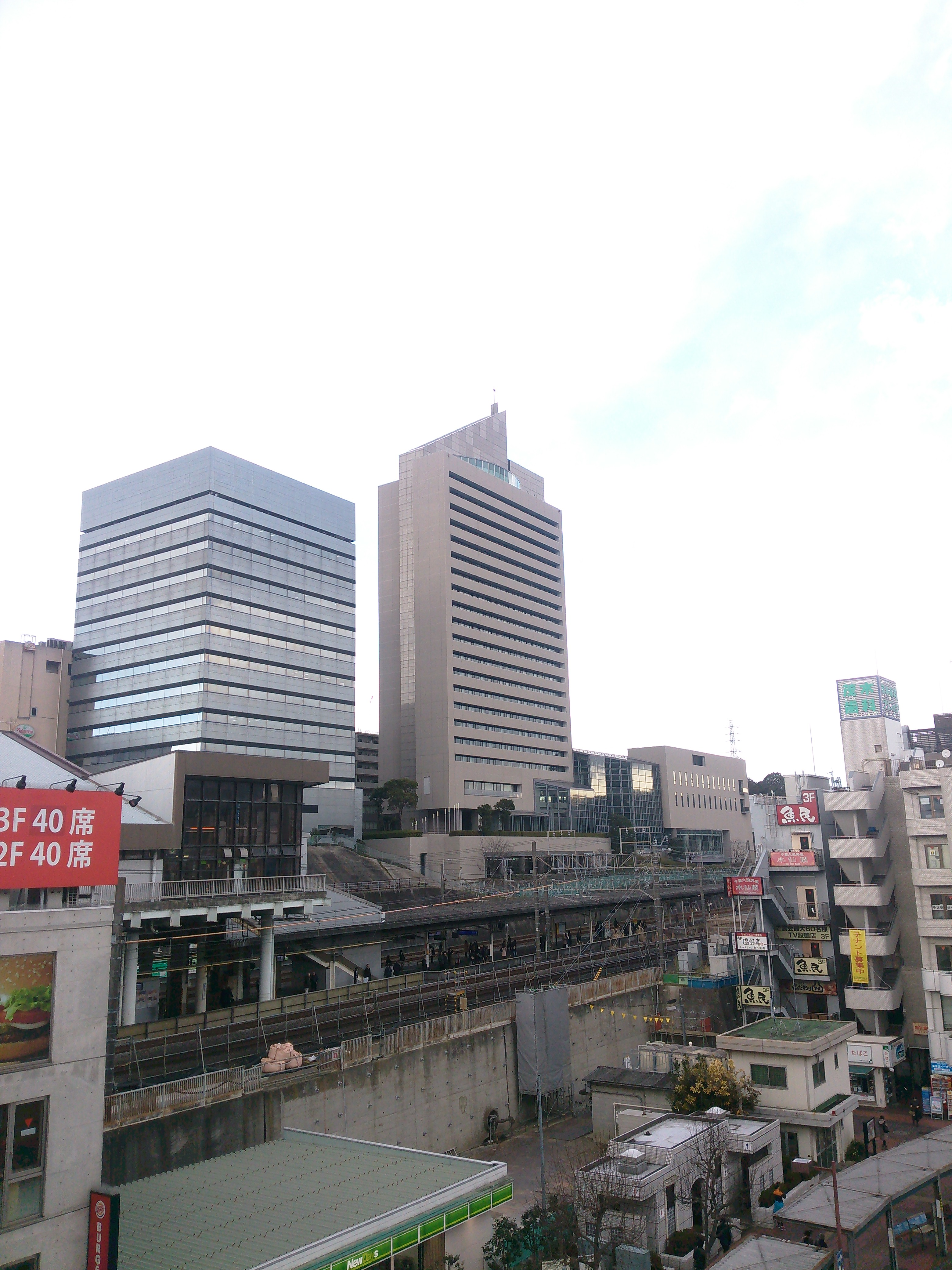 横浜市戸塚区、第一生命東戸塚教育センター新館